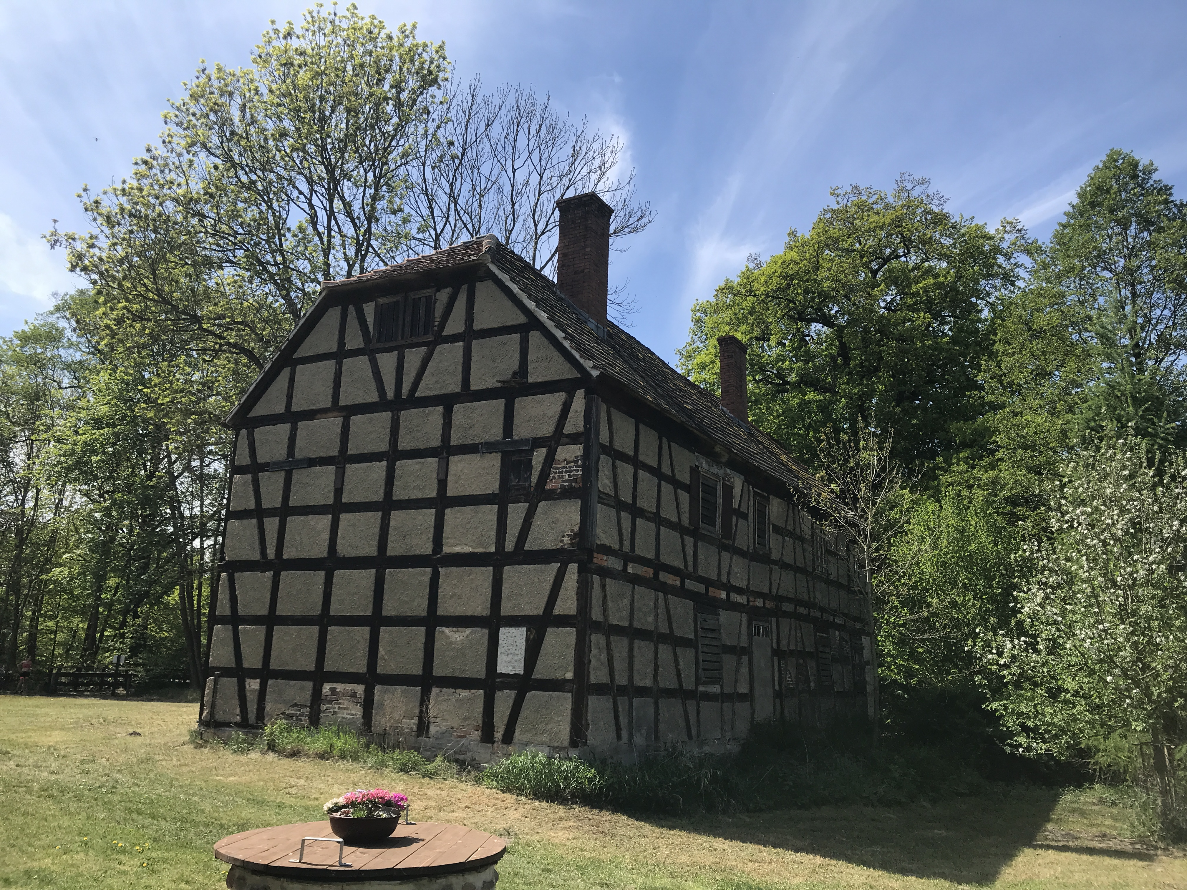 Die Horstmühle ist ein Wohnplatz mit einem denkmalgeschützten Ensemble einer ehemaligen Mühle in Baruth/Mark in Brandenburg.